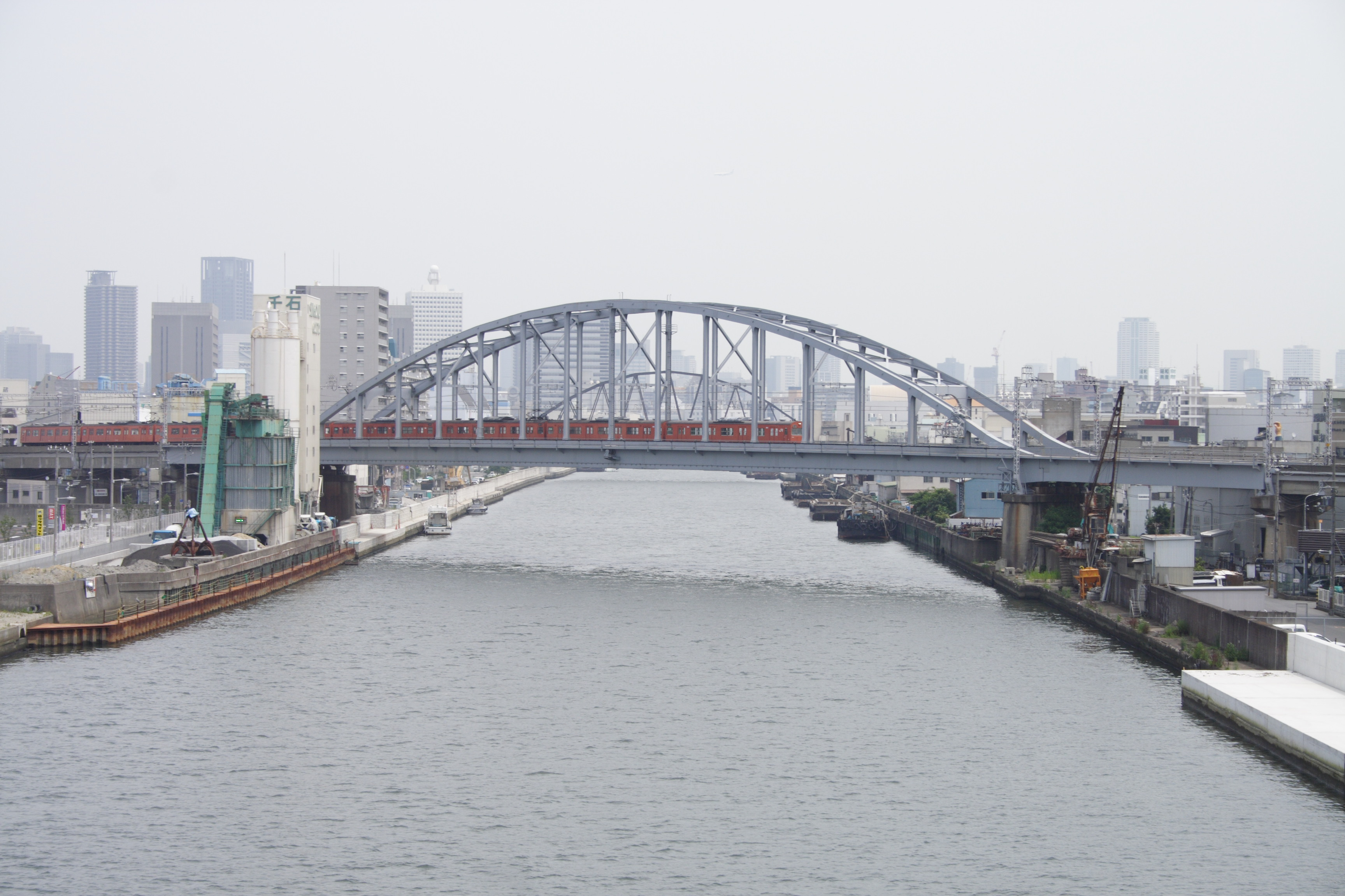 JR大阪環状線安治川橋梁